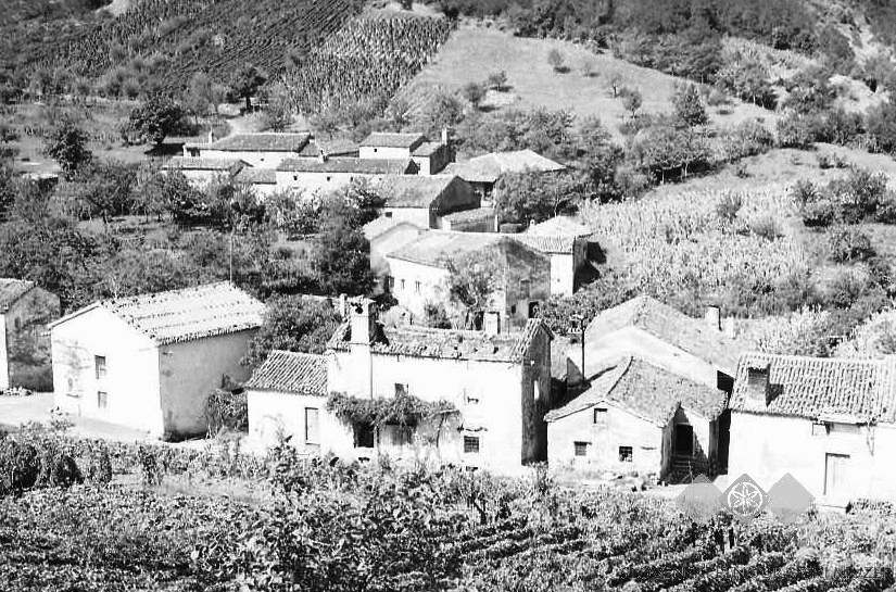 Pogled na Orehovico.